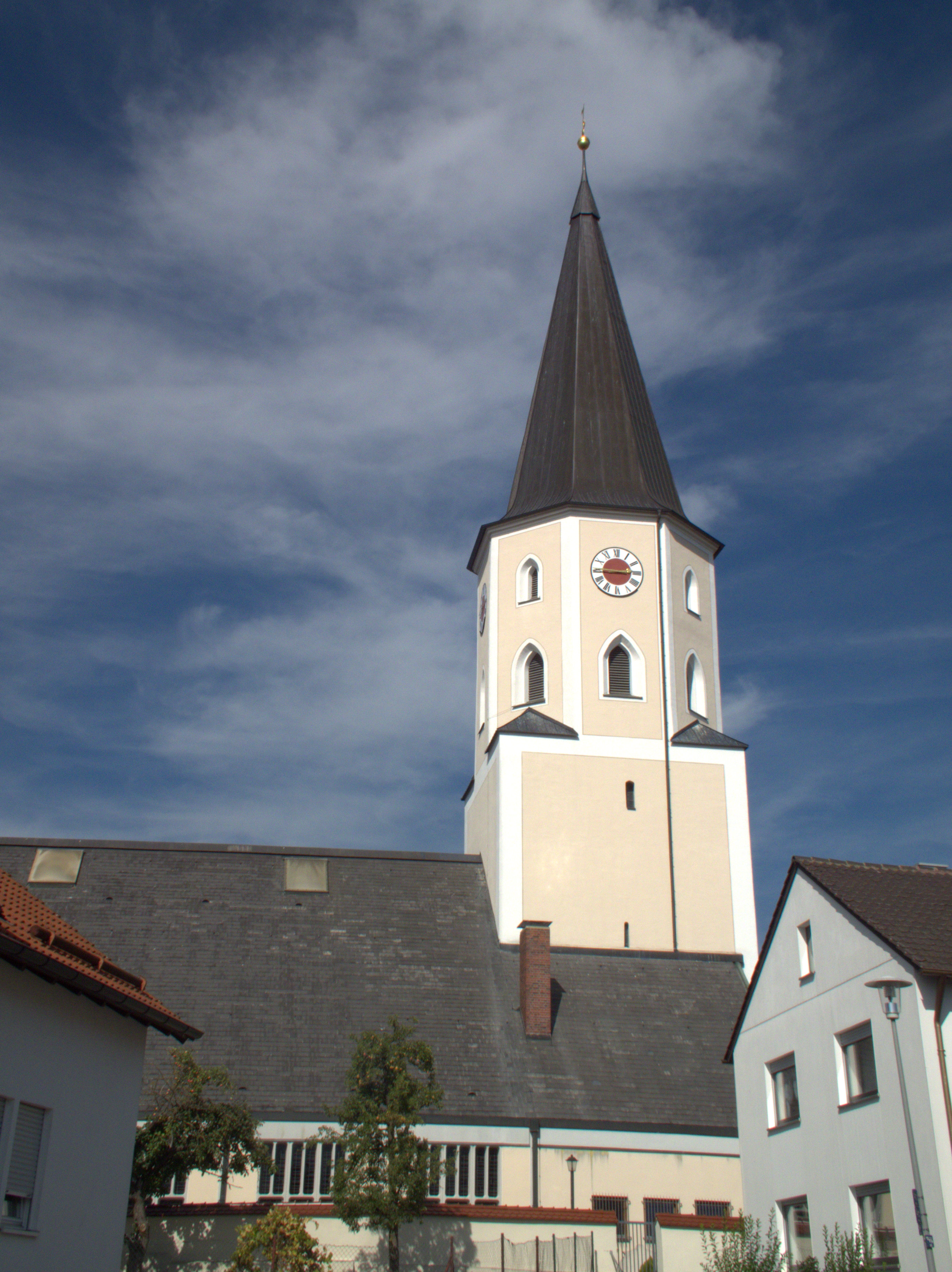 Die katholische Pfarrkirche St. Peter und Paul in Berngau bei Neumarkt in der Oberpfalz